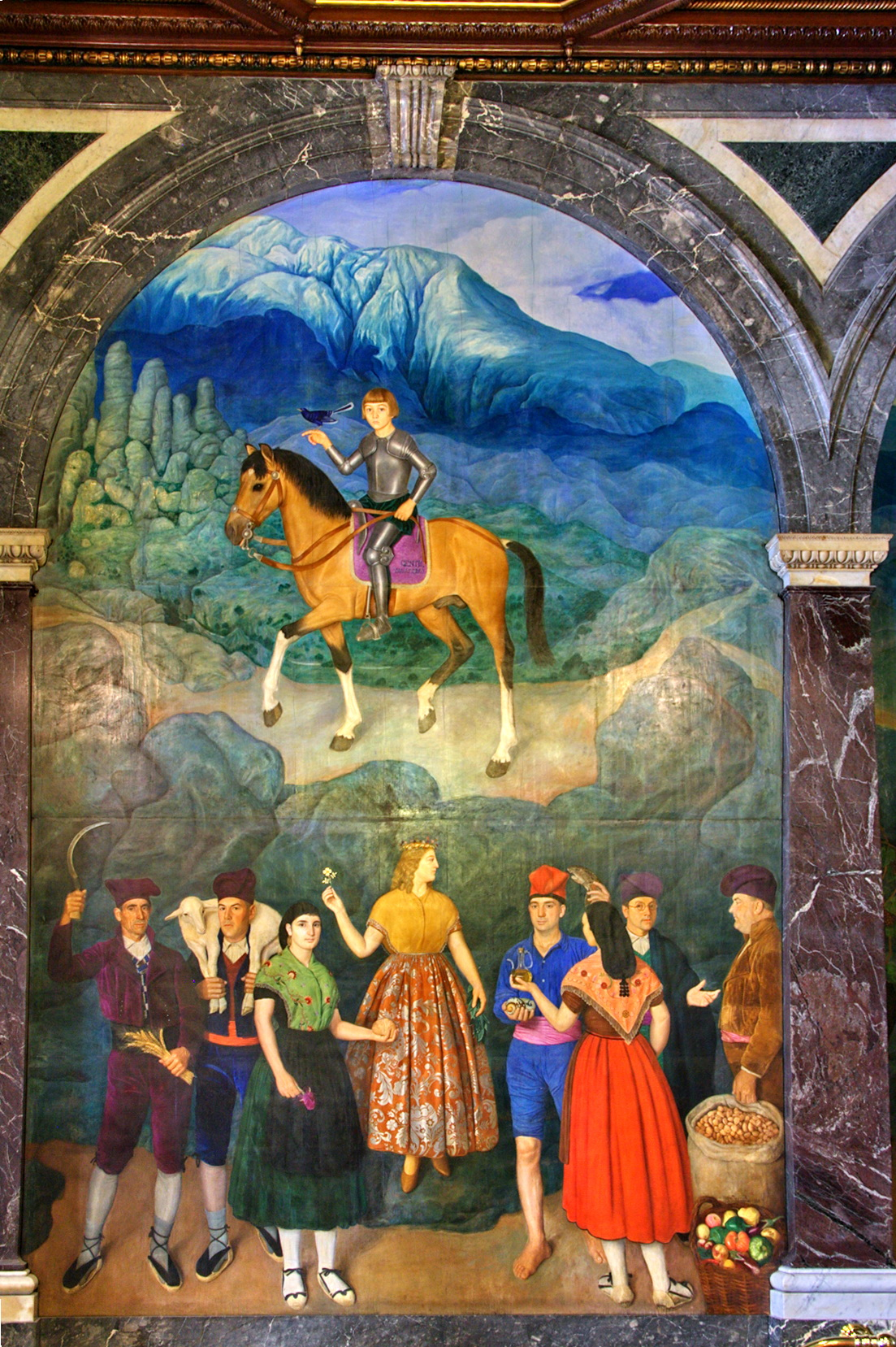 Pintura mural de Miquel Viladrich de l'any 1928 o 1930 que té per títol Barcelona Cap i Casal de Catalunya. Representa una al·legoria de Catalunya amb personatges tradicionals i amb símbols com la sardana, les illes Medes, la muntanya de Montserrat, així com temes relatius al poema Canigó de Jacint Verdaguer, emmarcades com un tríptic per tres arcs cecs de marbre.